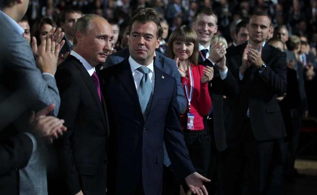 На съезде партии «Единая Россия».